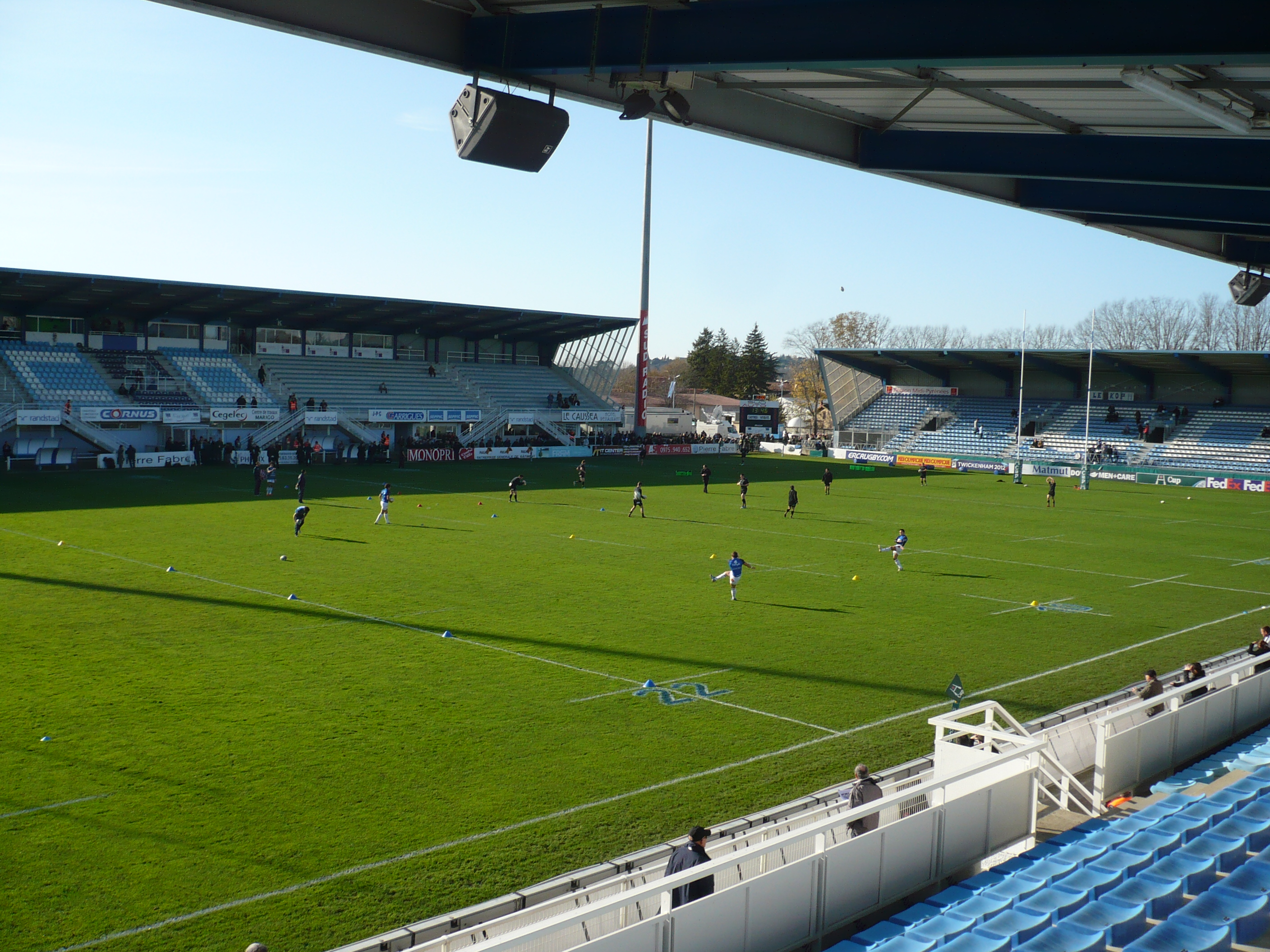 Stade Pierre-Antoine à Castres dans le département français du Tarn.